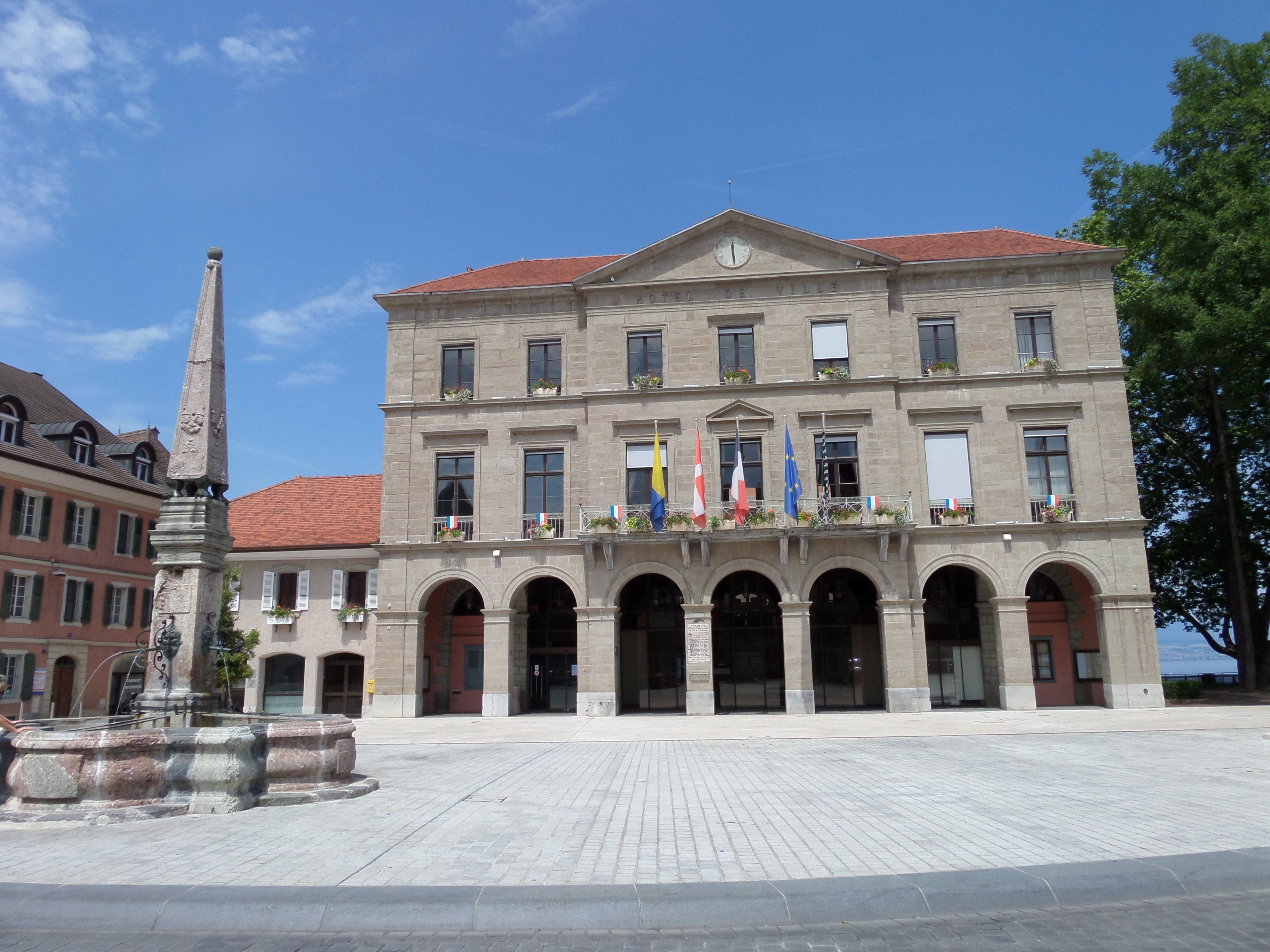 Hôtel de ville de Thonon-les-Bains avec sa fontaine